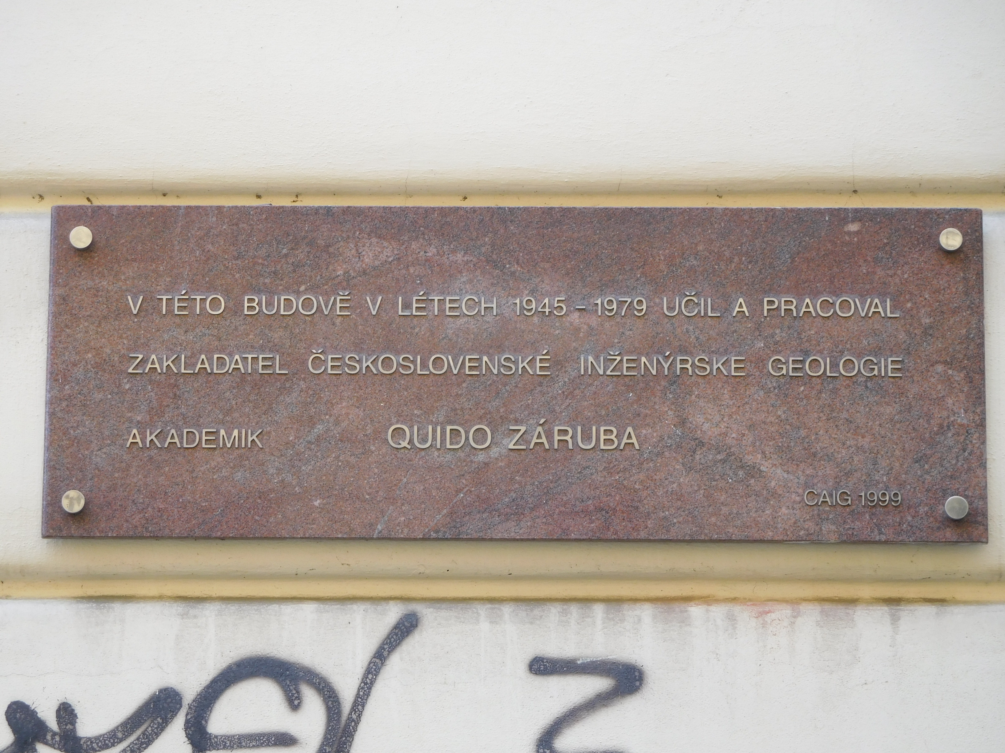 Praha - Nové Město, Trojanova 13, pamětní deska Quida Záruby